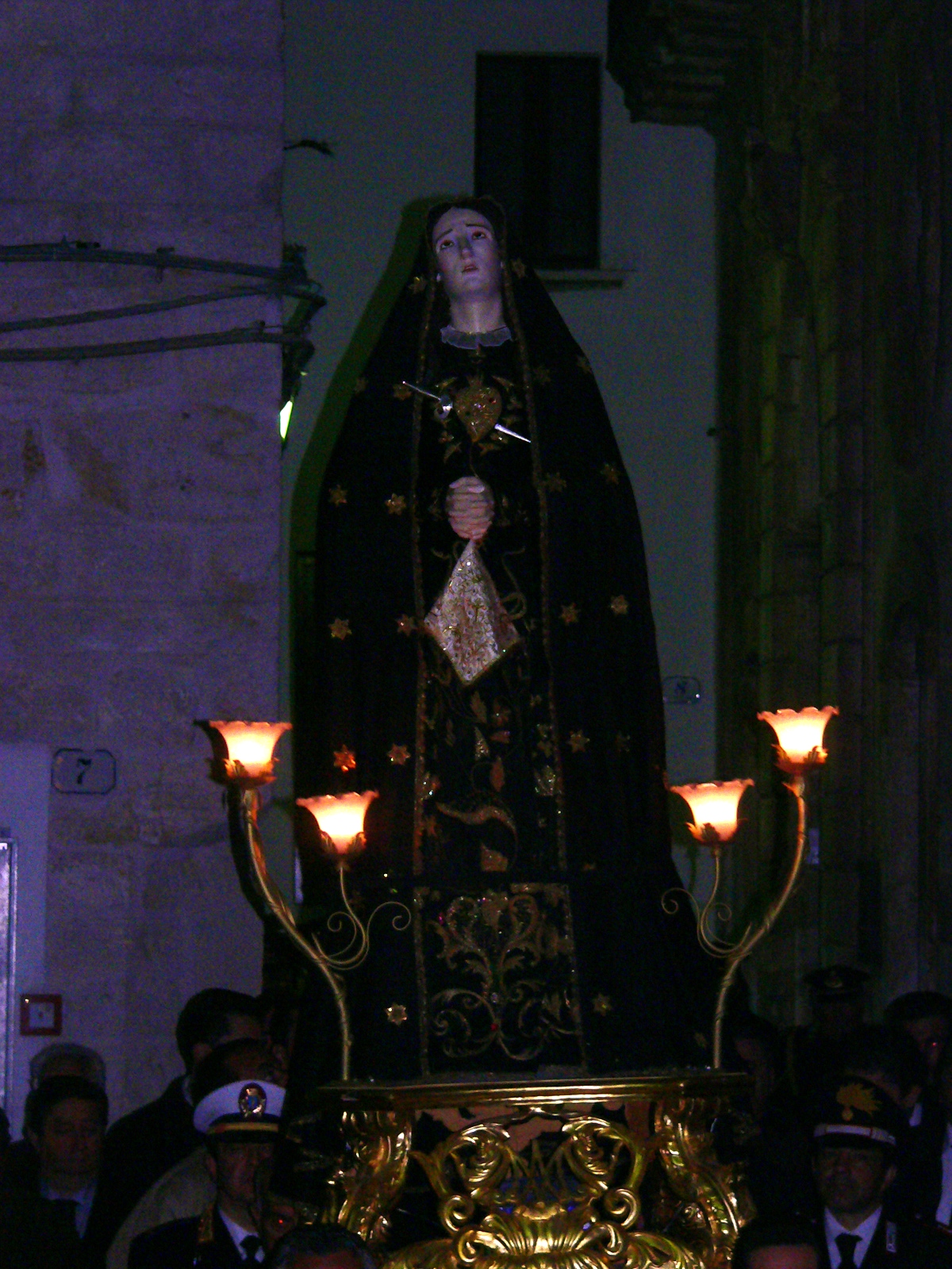 Statua dell'Addolorata portata in processione a Ceglie Messapica in occasione della processione dei Misteri.